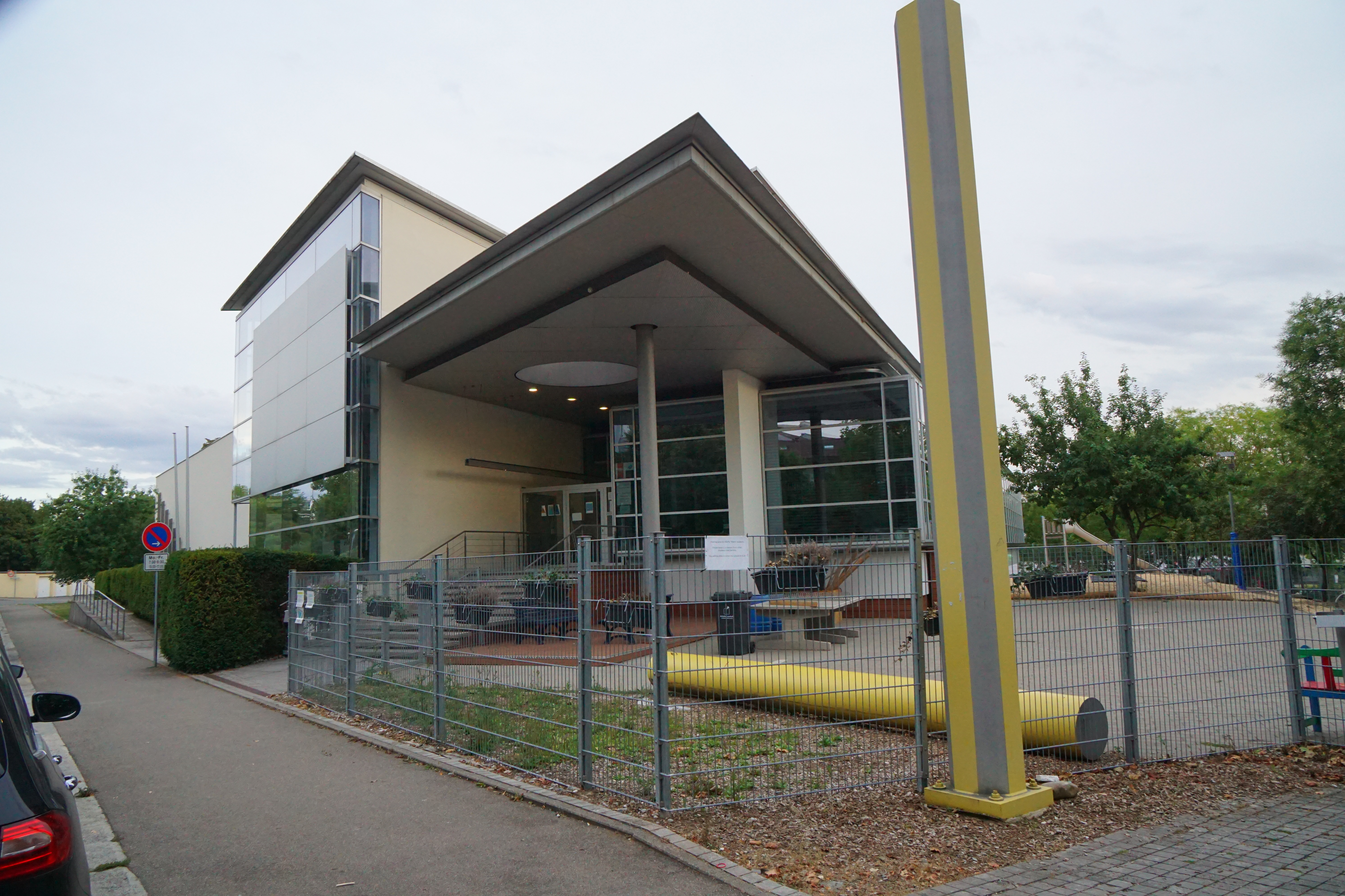 International School Stuttgart, Sindelfingen Campus, ​Hallenser Str. 2 Sindelfingen.